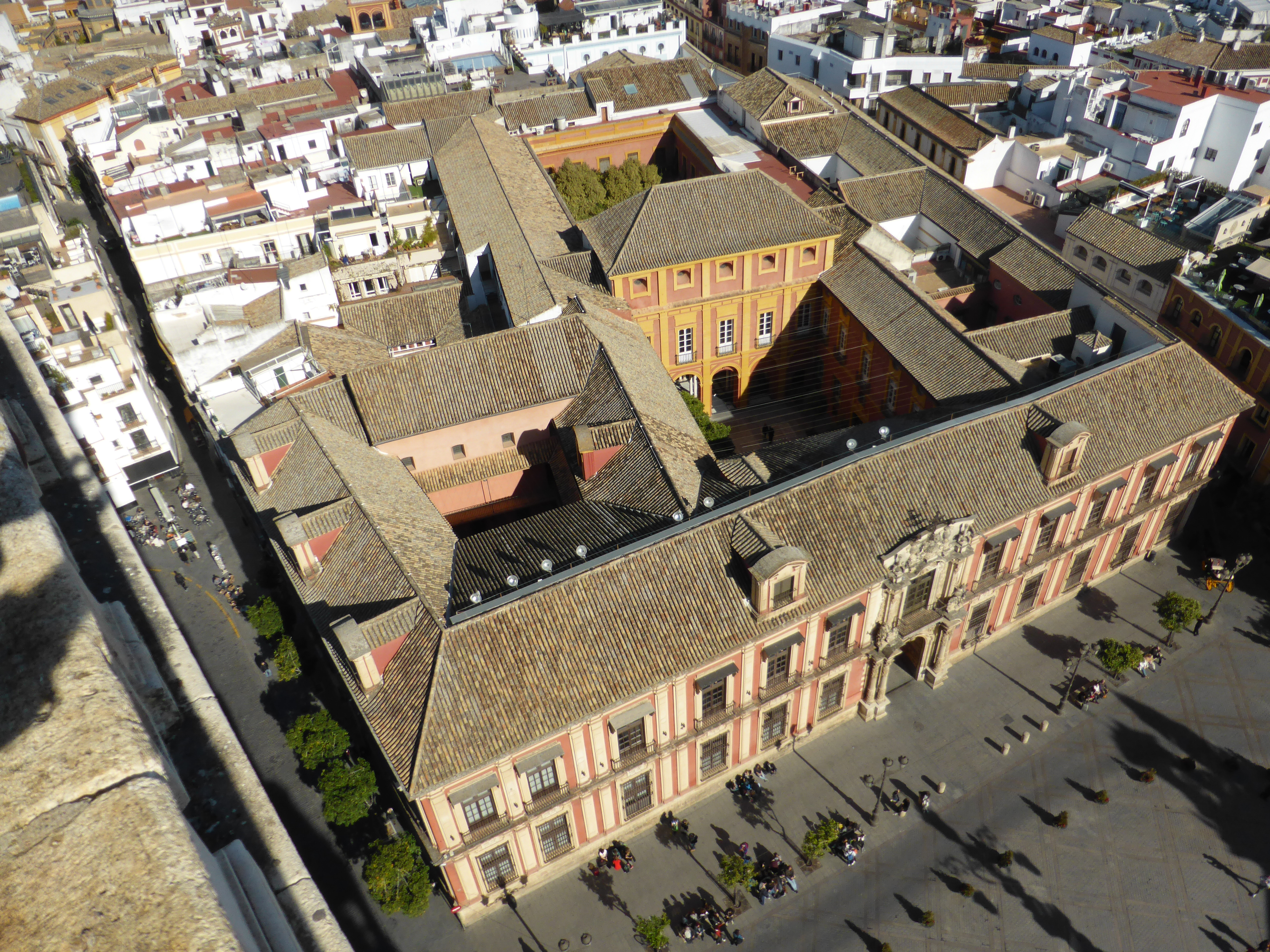 Subiendo al mirador del cuerpo de campanas de la torre de la Giralda, de la catedral de Sevilla, se ve esta vista del conjunto del palacio arzobispal. La fachada principal tiene una destacada portada barroca.